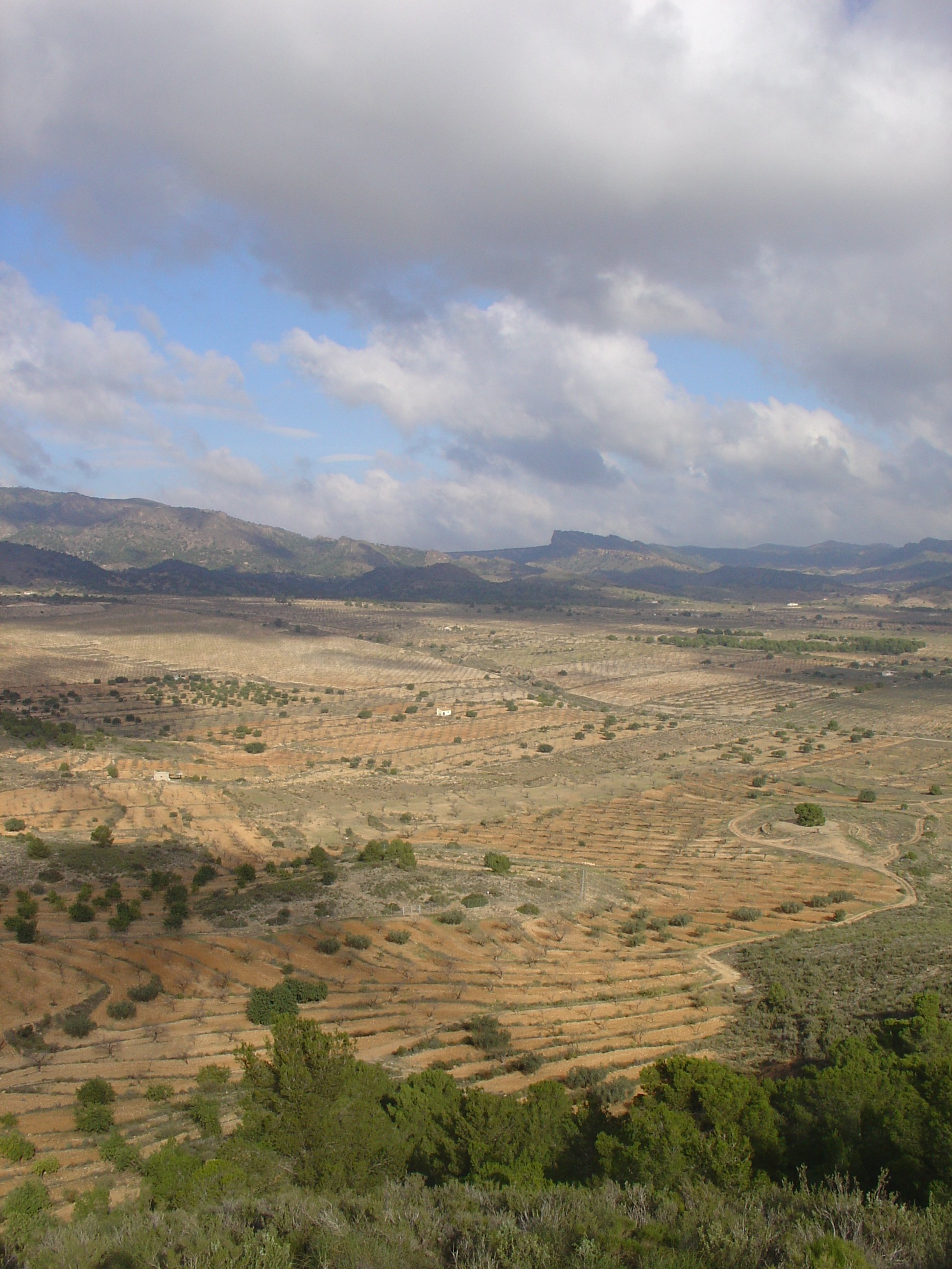 Vista de campos de almendros en la Sierra de Carrascoy (La Murta), en Murcia, España.